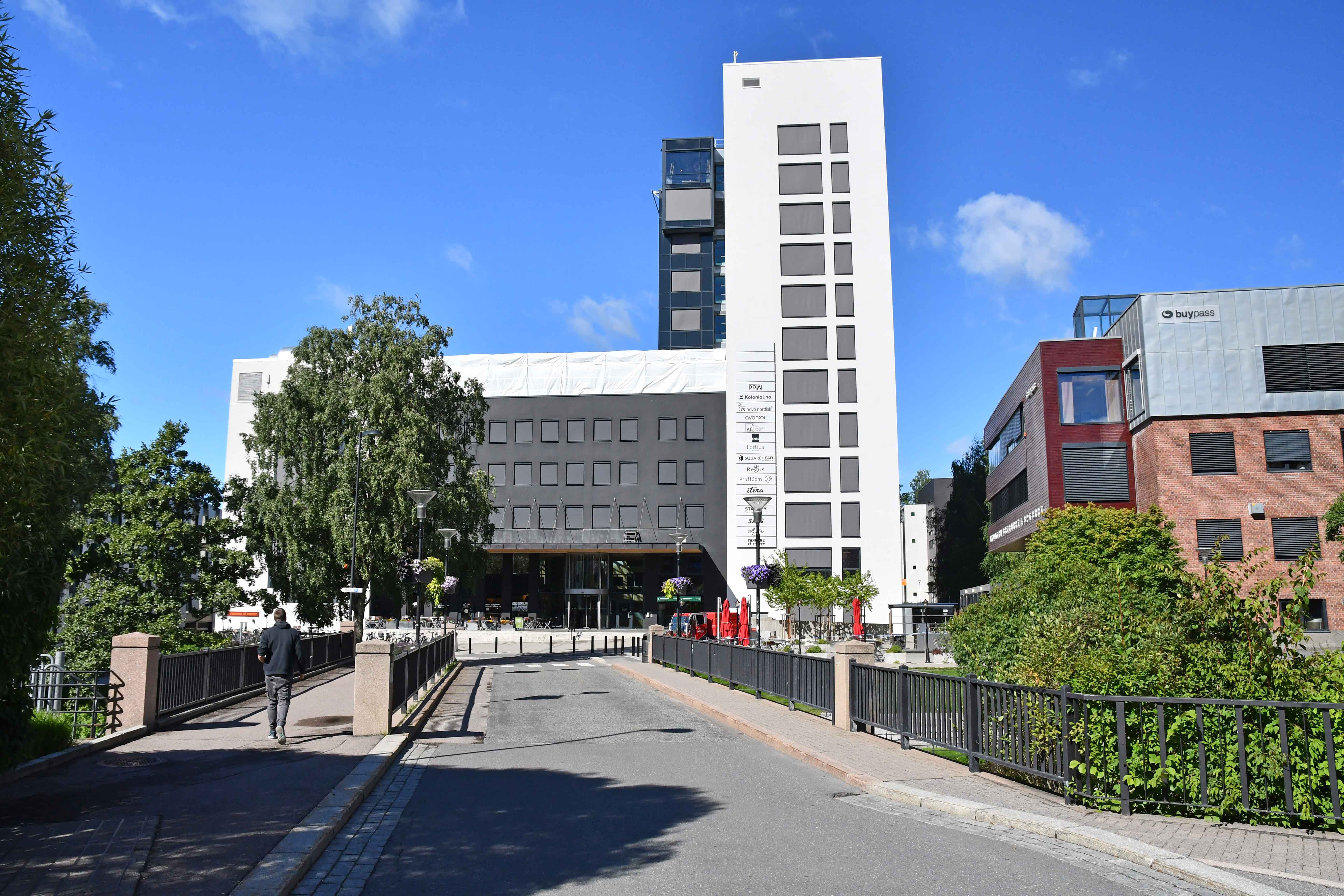 Gullhaug bru, Nydalen, Oslo, sett fra Gullhaug torg